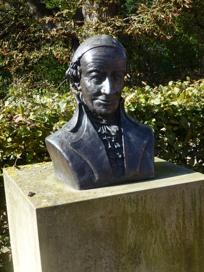 Wielandbüste in Oßmannstedt